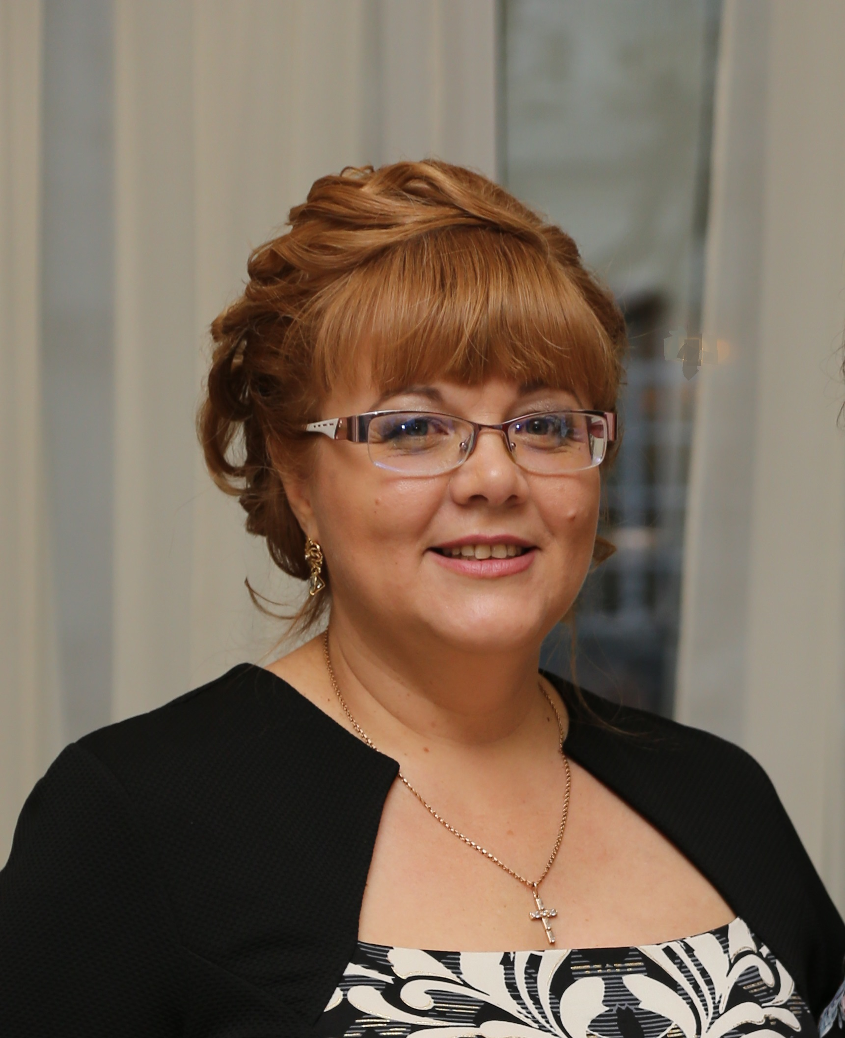 Портрет Светланы Соло